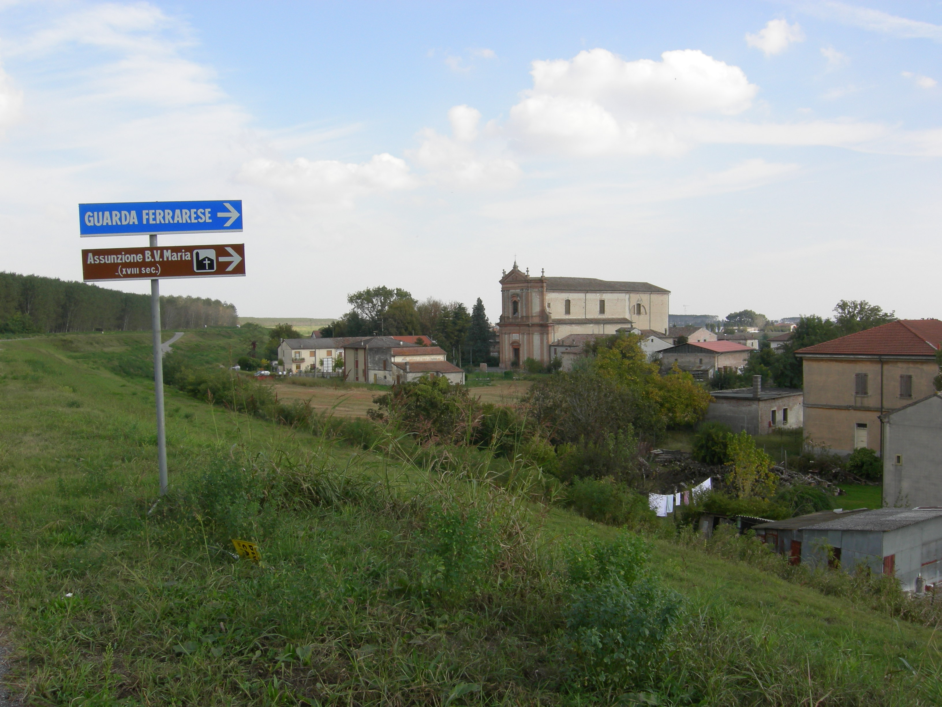 Pista ciclabile Destra Po - Fe 20. Località Guarda Ferrarese. Sullo sfondo la chiesa dell'Assunzione di Maria Santissima (sec. XVIII) This is a photo of a monument which is part of cultural heritage of Italy.